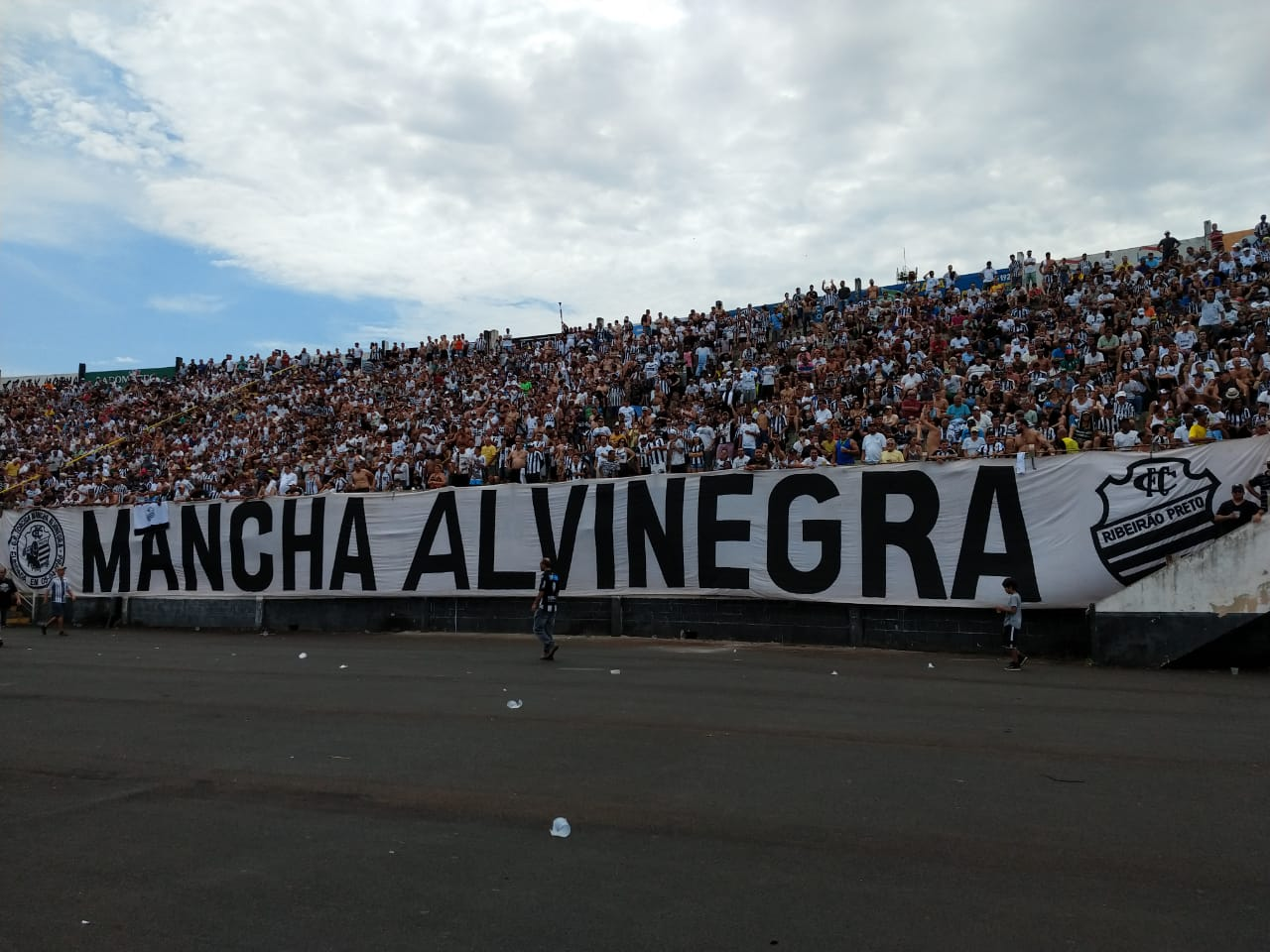 Torcida Mancha Alvinegra do Comercial Futebol Clube.